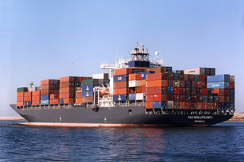 MS POMMERN unter dem Charternamen P&O NEDLLOYD UNITY im Suezkanal IMO number: 9121247 Details